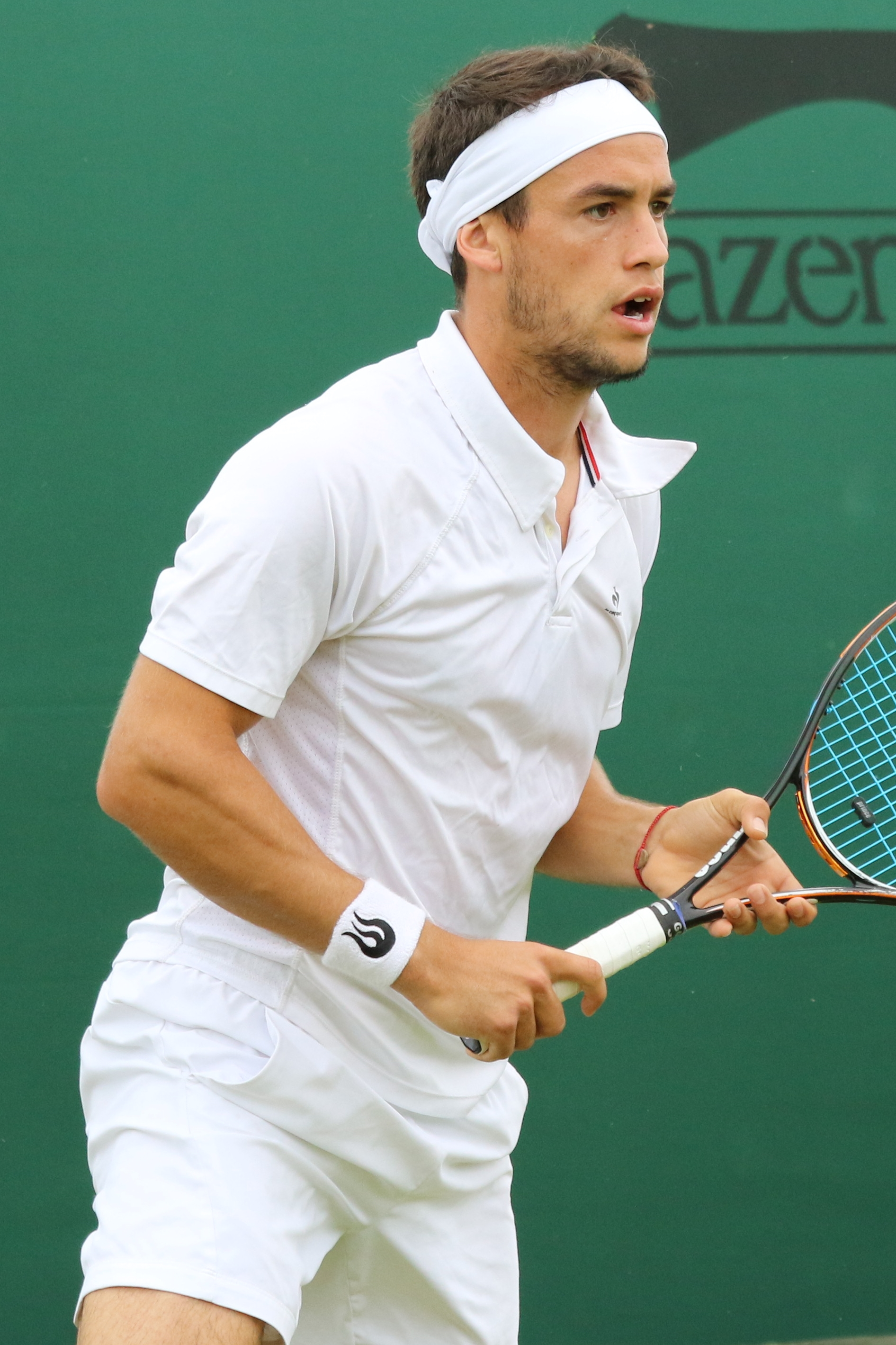 Kicker WMQ16 (15)